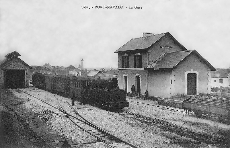 La gare terminus de la ligne à voie métrique de Surzur à Port-Navalo, vers 1910.